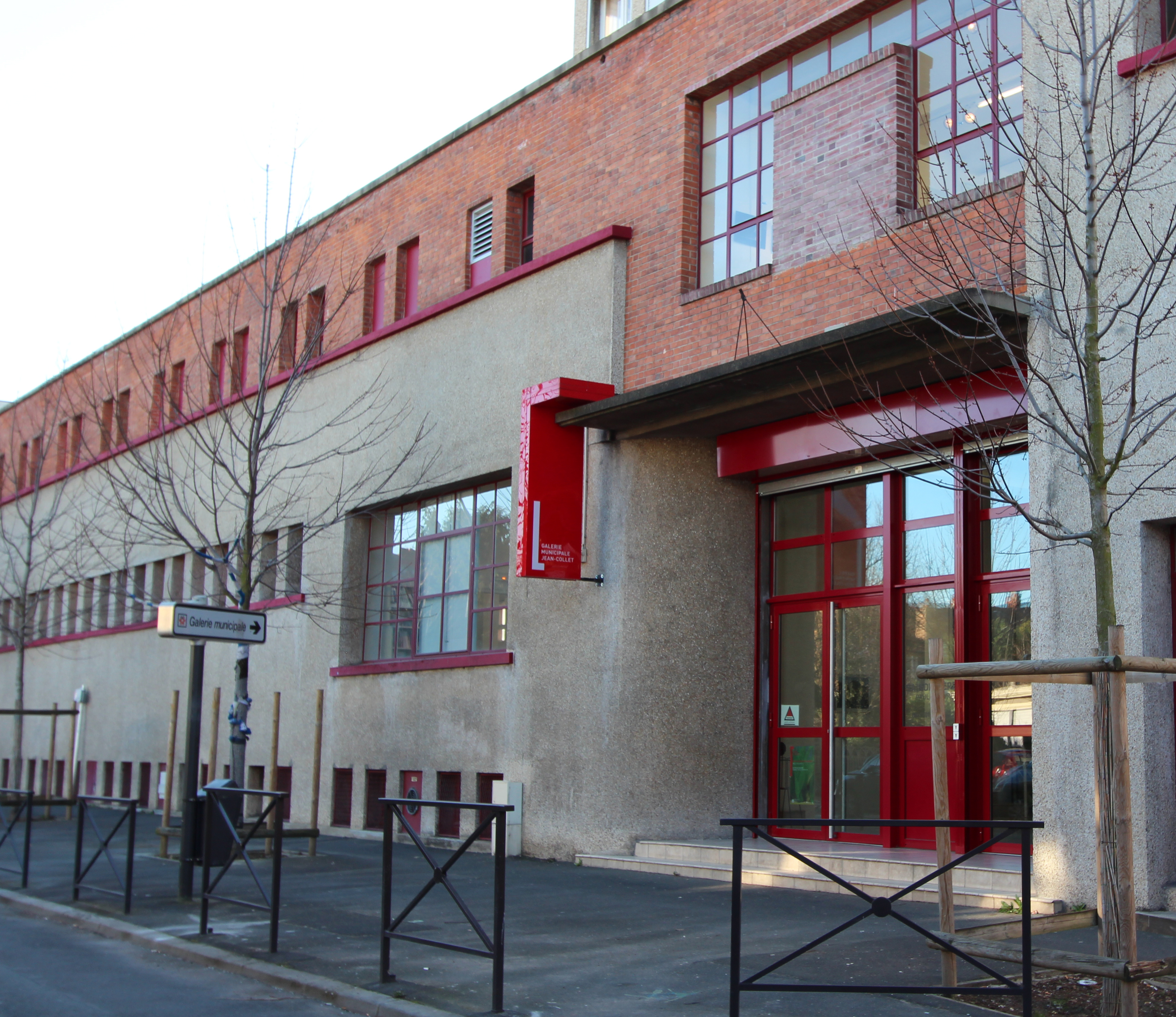 Vitry-sur-Seine